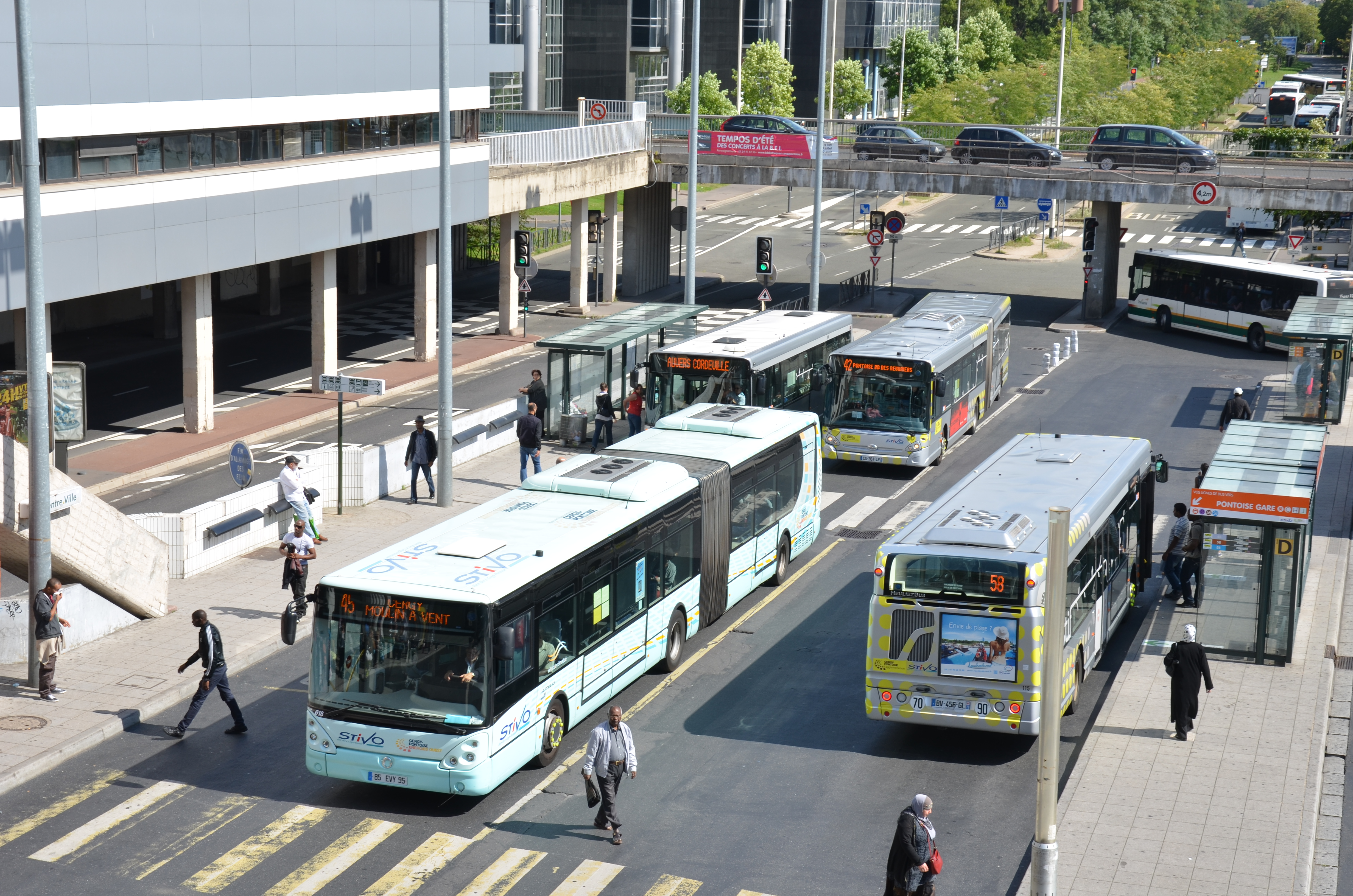 La gare routière de Cergy Préfecture, où sont présents de nombreux bus du réseau STIVO.